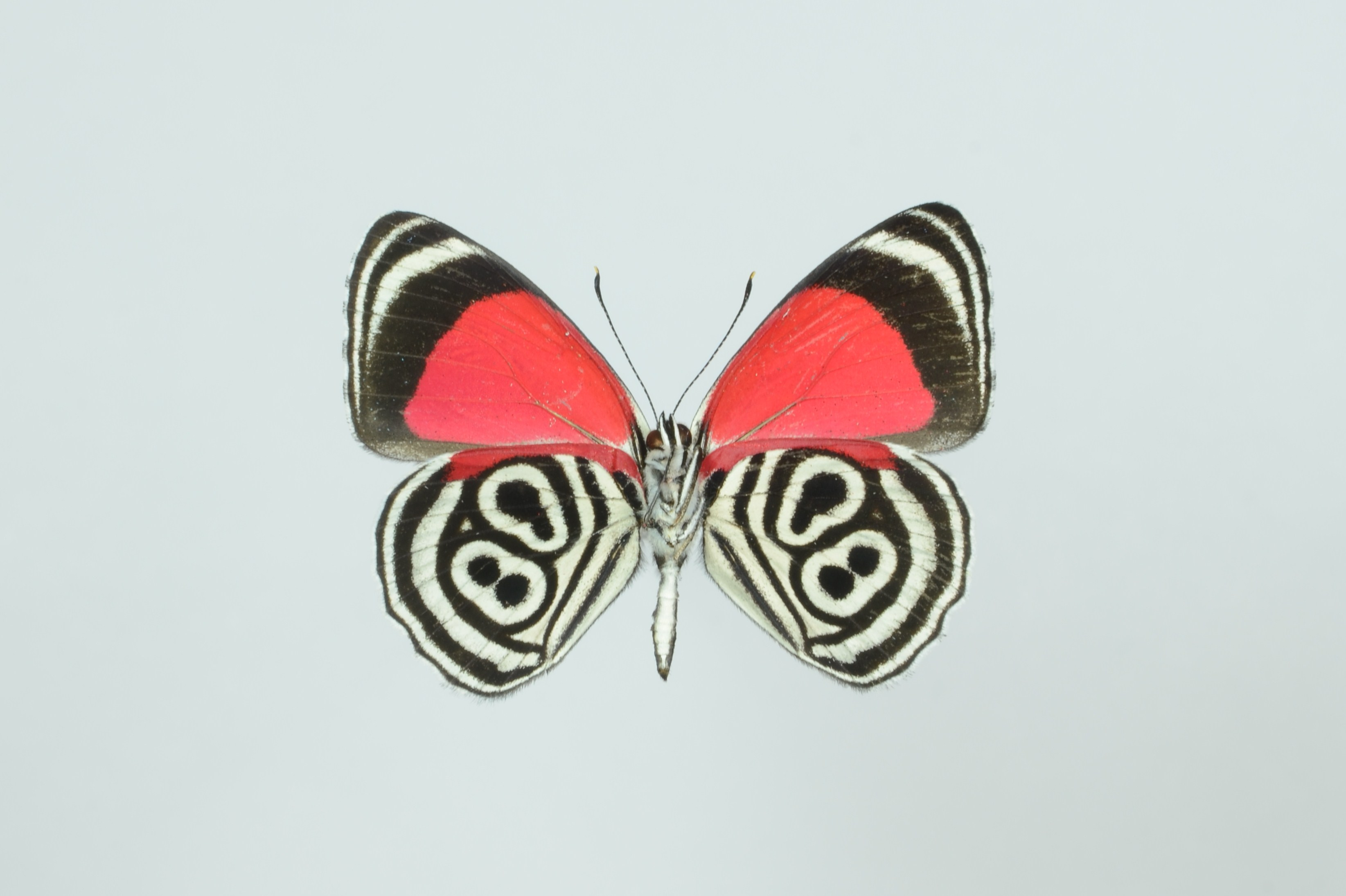 Diaethria clymena ventral. Rio Napo, Orellana Province, Ecuador